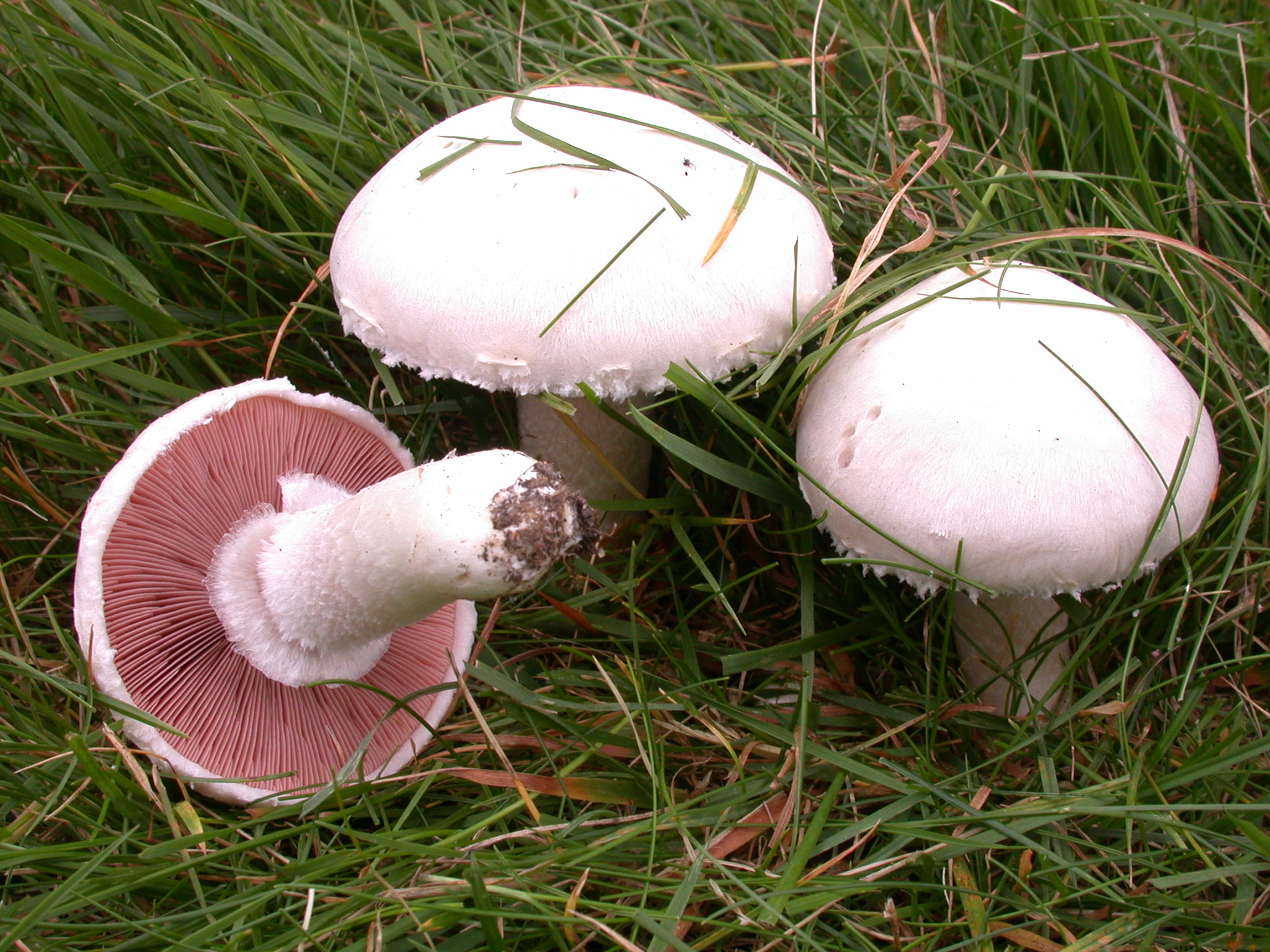 A. campestris